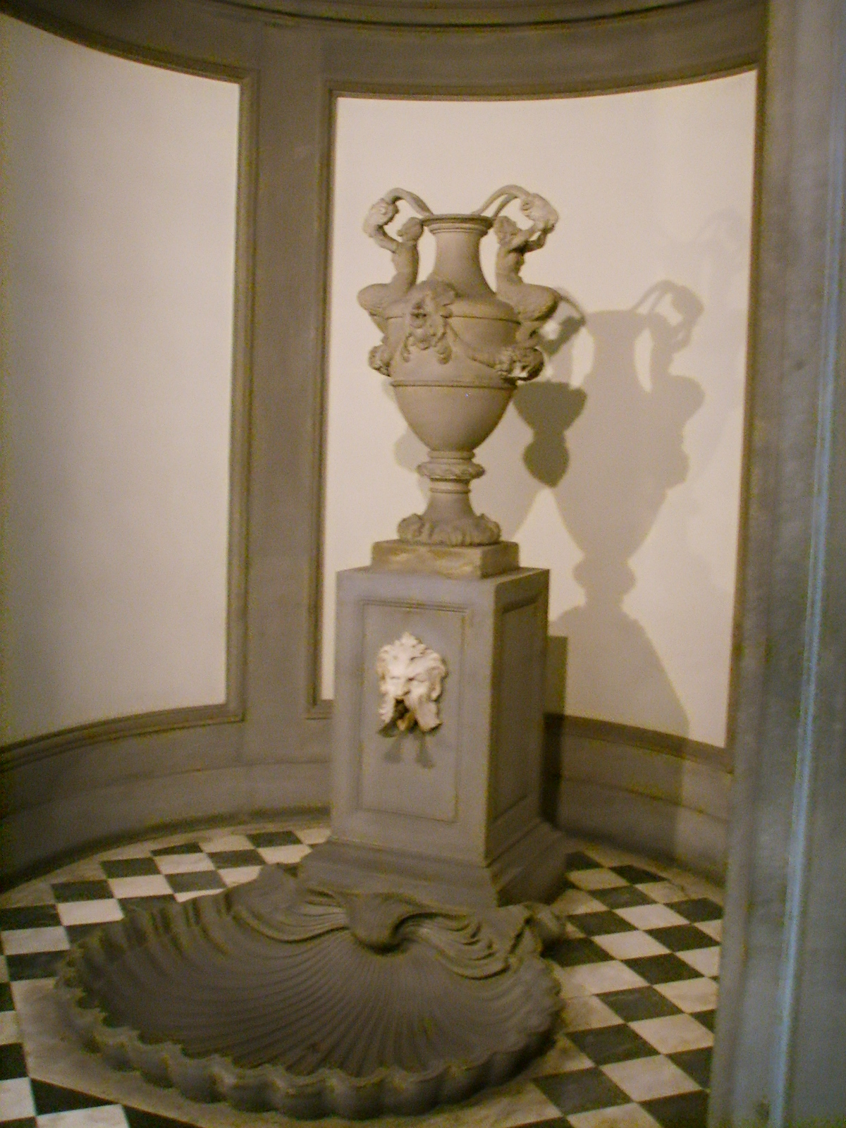 Palazzo_Venturi_Ginori_fontana in Florence, italy